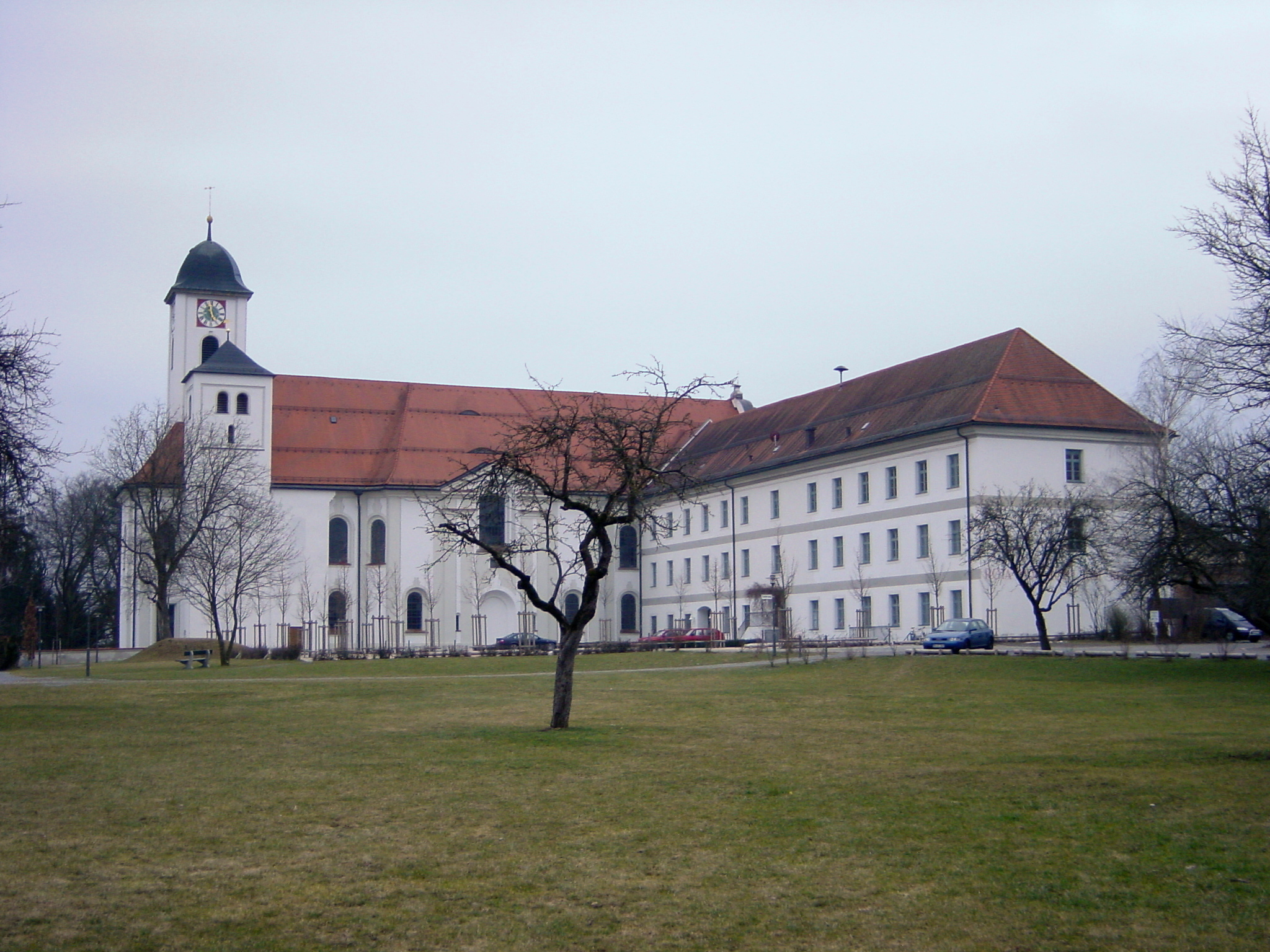 Rott am Inn, Klosterkirche